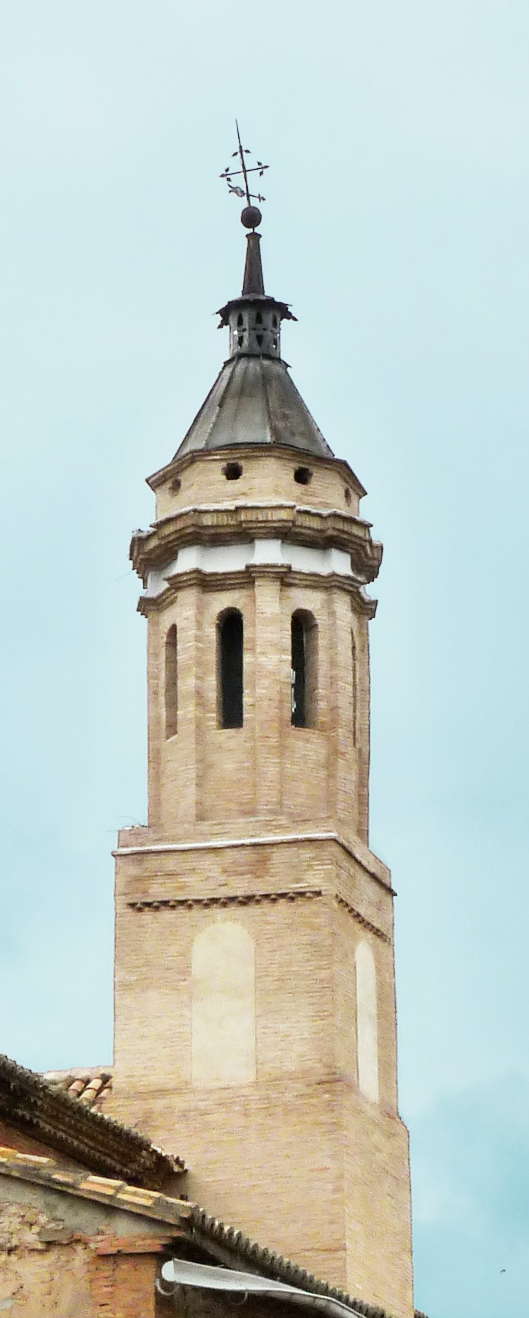 Bulbuente - Iglesia de Santa María (s. XV) - Torre (s. XVII)